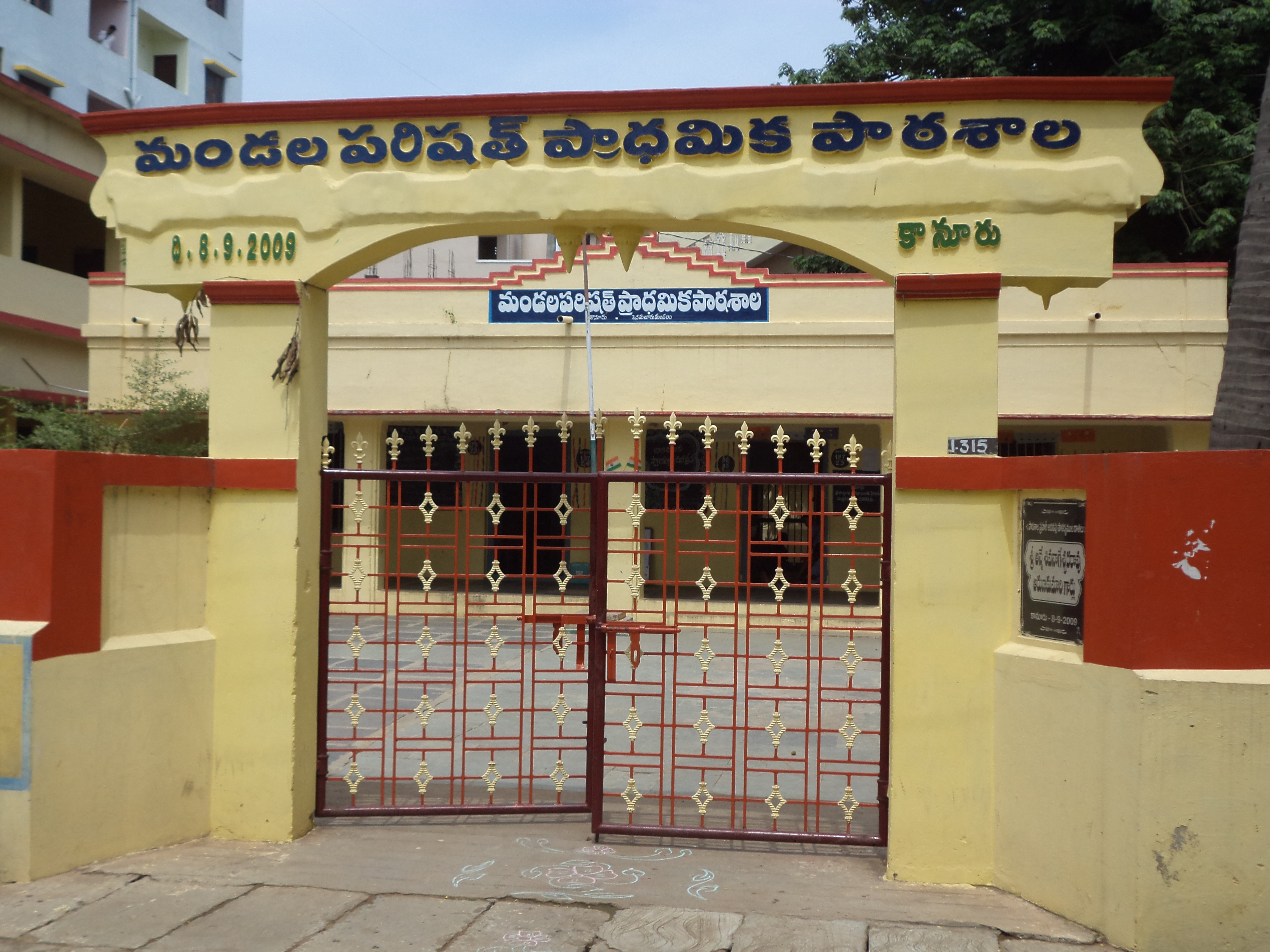 మండల పరిషత్ ప్రాధమిక పాఠశాల